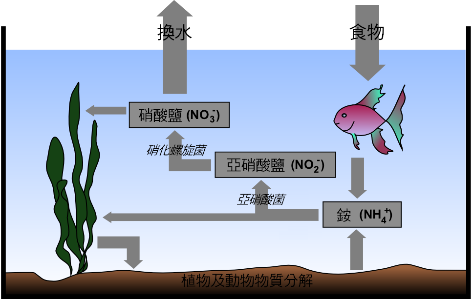 中文（香港）: 水族槽內的氮元素循環。